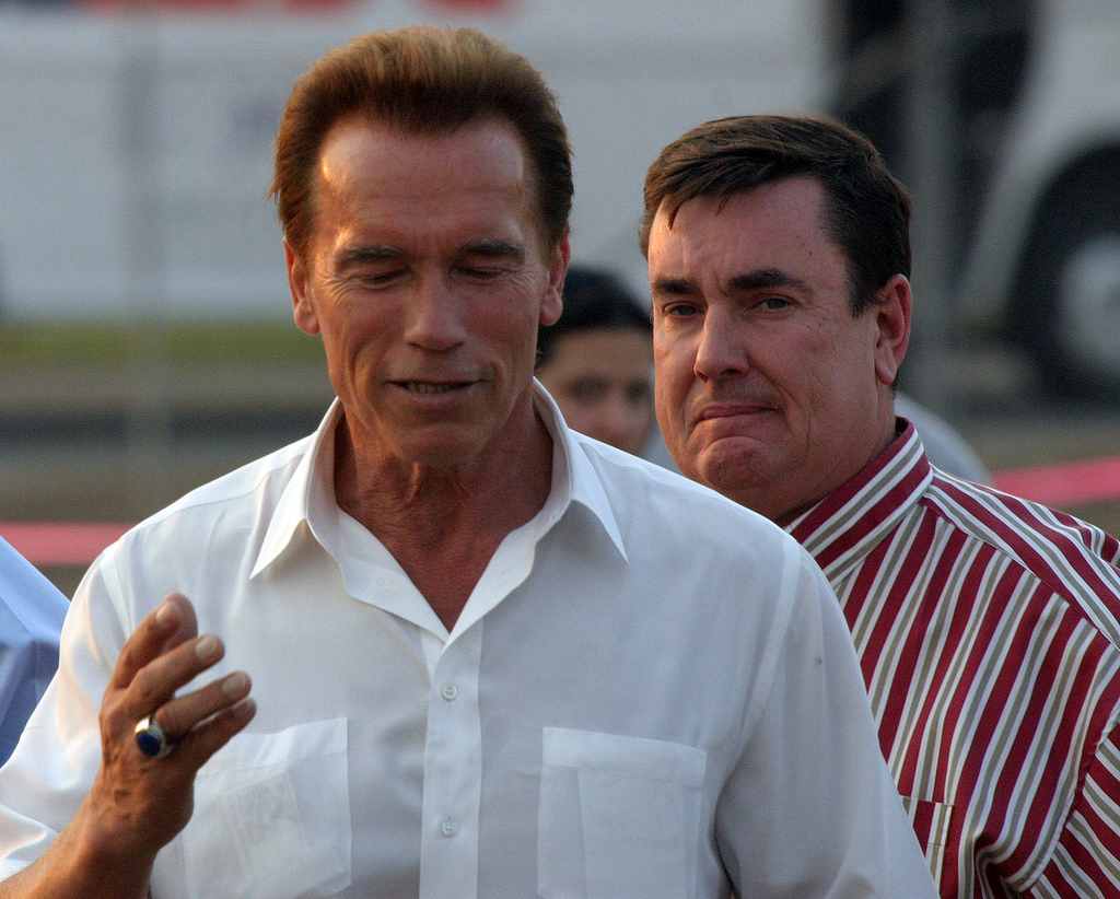 Arnold Schwarzenegger and Assemblyman Joel Anderson.